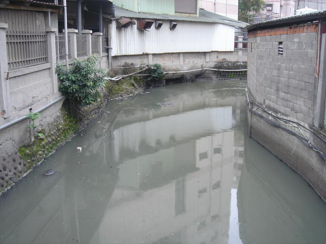 建一路90號以西的二八張溝